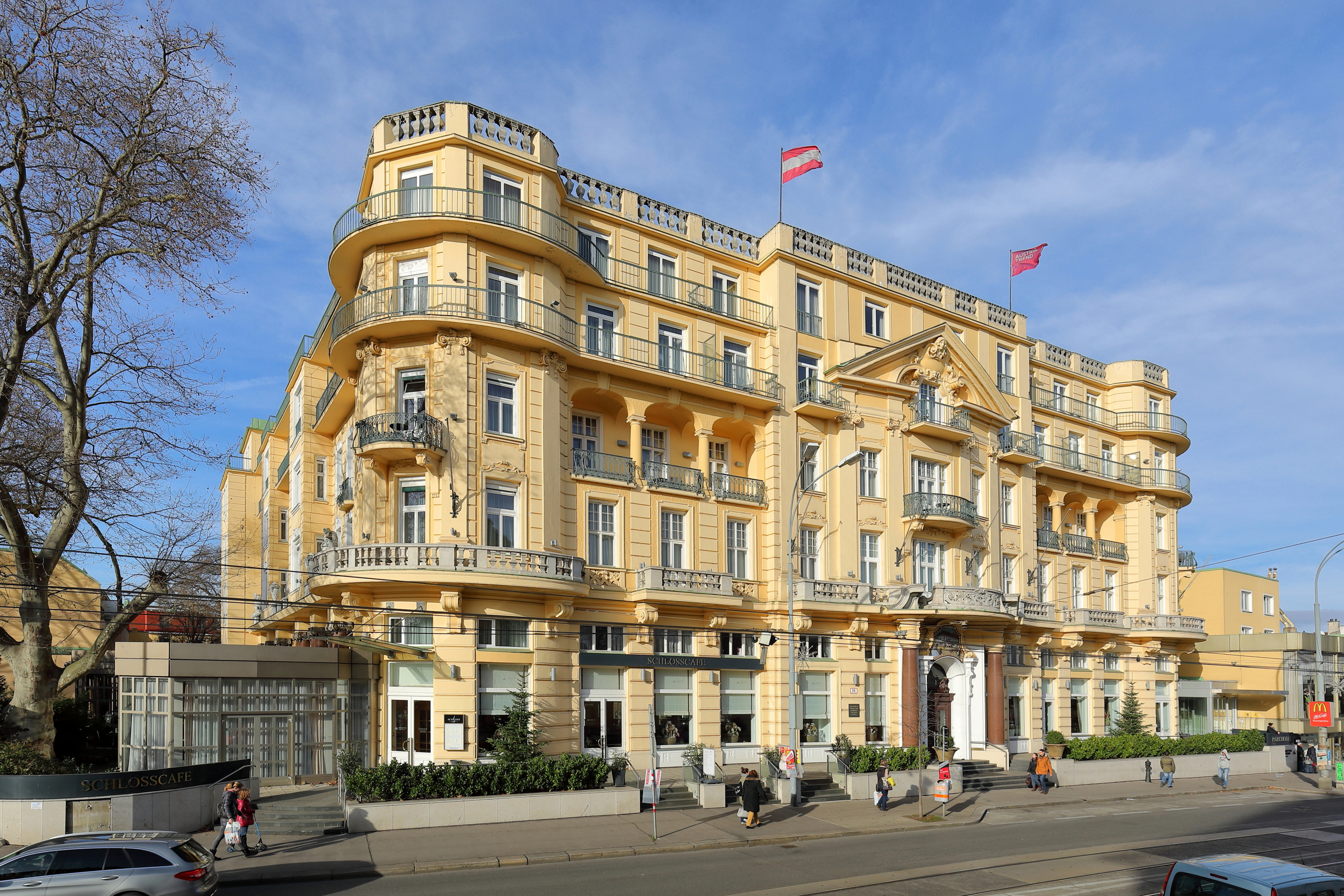 Das Parkhotel Schönbrunn im 13. Wiener Bezirk Hietzing von der Hietzinger Hauptstraße aus gesehen (Ostsüdostansicht). Das Hotel wurde 1907/08 an der Stelle des ehemaligen Casino Dommayer nach Plänen des Architekten Arnold Heymann von Paul Hopfner als luxuriöses "Hopfners Parkhotel Schönbrunn" errichtet.